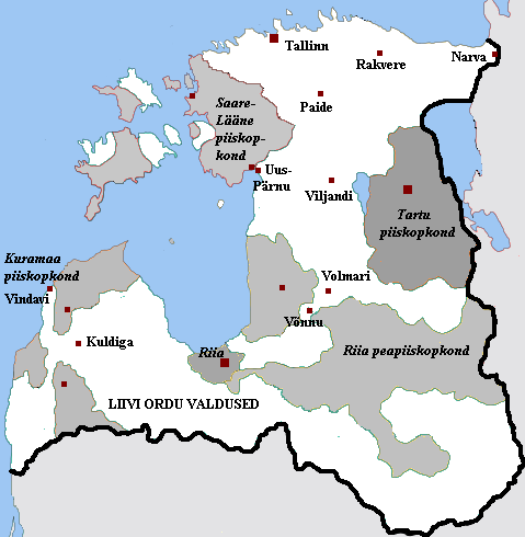 Liivi ordu valduste eestikeelne kaart